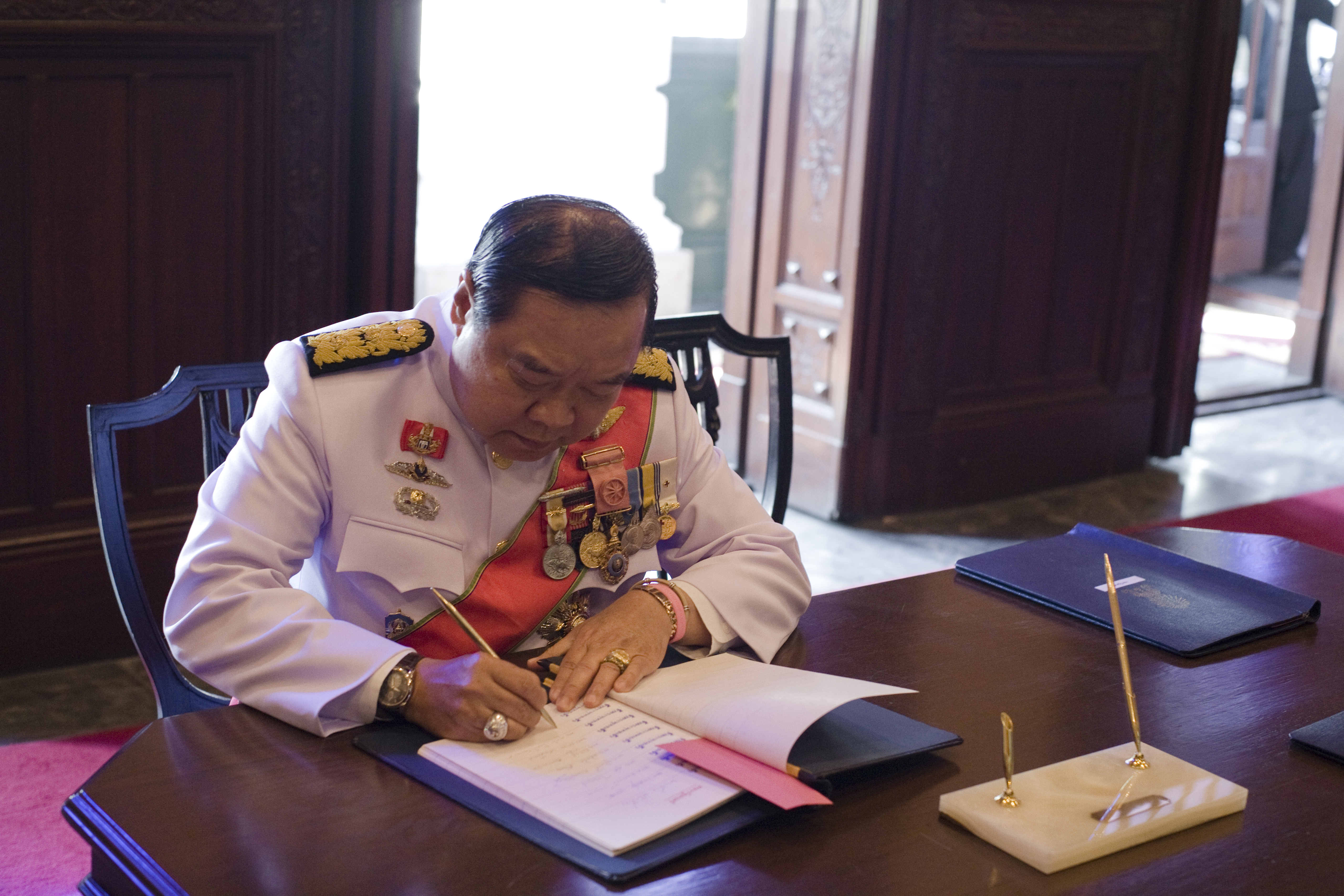 คณะรัฐมนตรีลงนามถวายพระพรชัยมงคลเนื่องในวันเฉลิมพระชนมพรรษาพระบาทสมเด็จพระเจ้าอยู่หัว ณ ห้องแดง ศาลาว่าการพระราชวังในพระบรมมหาราชวัง วันอาทิตย์ ที่ 5 ธันวาคม พ.ศ.2553 (Photographer attached to the Prime Minister of the Kingdom of Thailand : Peerapat Wimolrungkarat / พีรพัฒน์ วิมลรังครัตน์) @is50mm